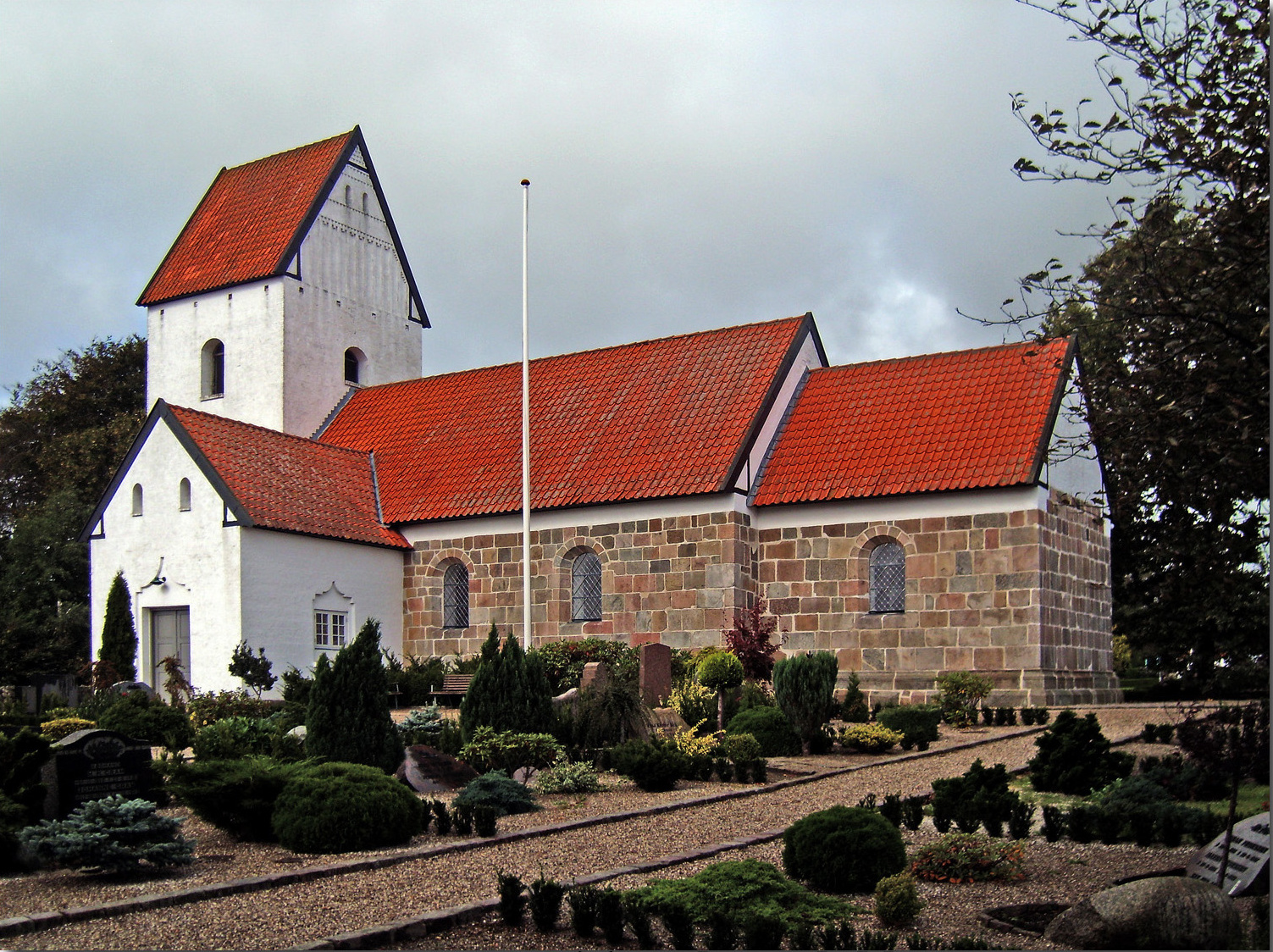 fra nord